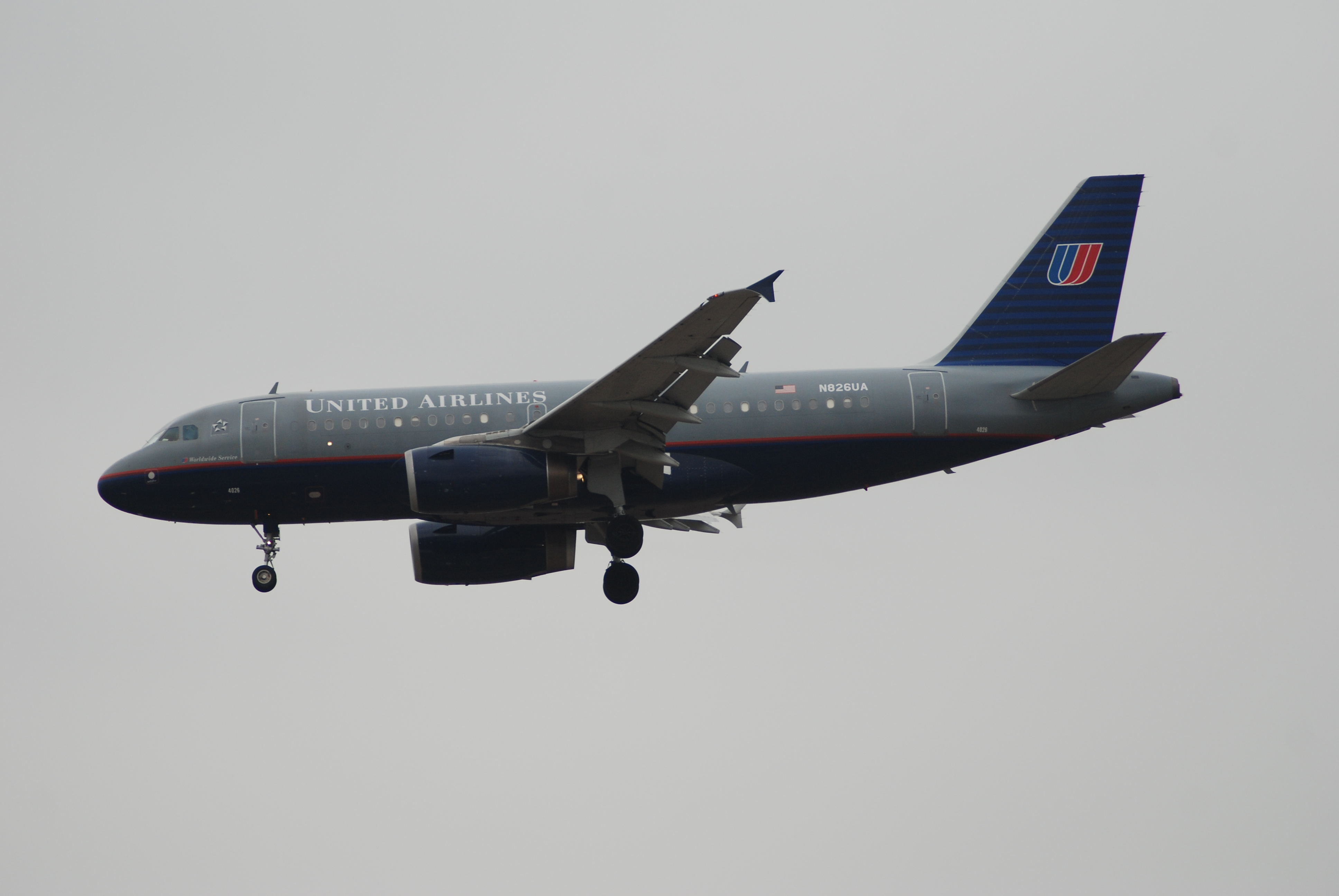 N826UA@LAX;17.04.2007/462ey